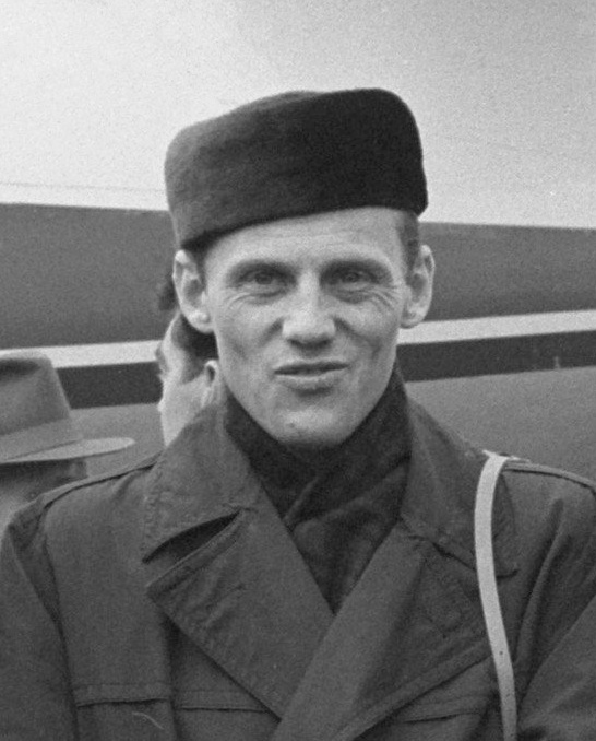 Ivar Nilsson